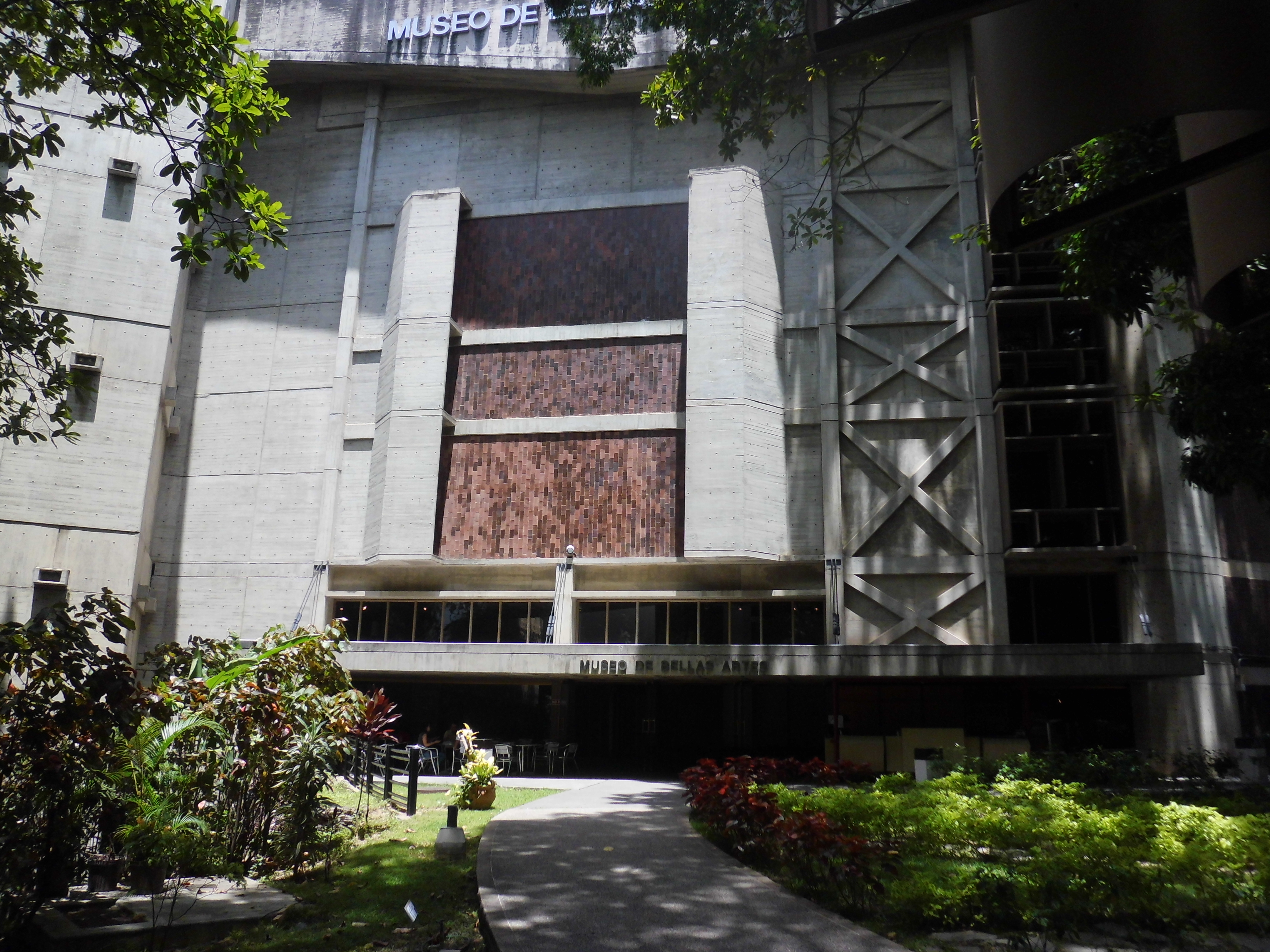 Museo de Bellas Artes de Caracas, Distrito Capital - Venezuela